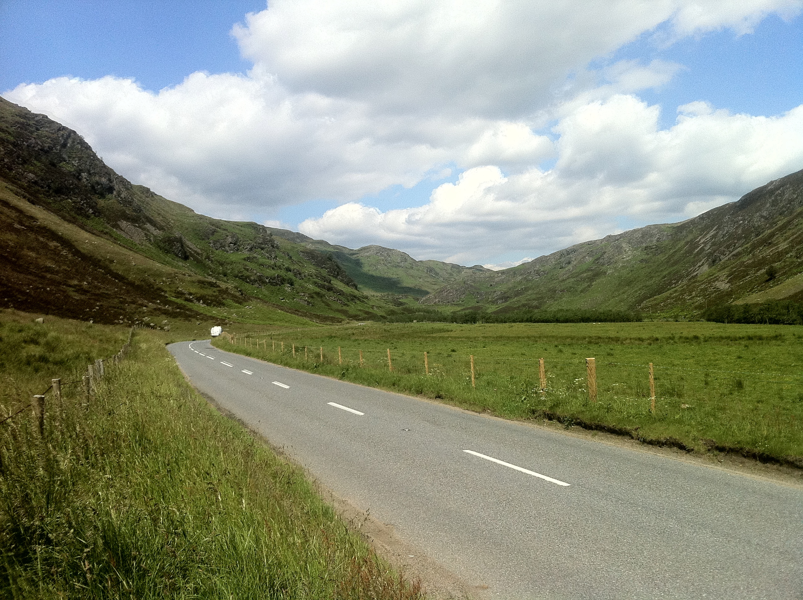 Sma' Glen